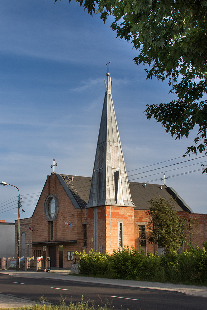 Kościół parafialny na bydgoskiej dzielnicy Jachcice w czerwcu 2017 roku